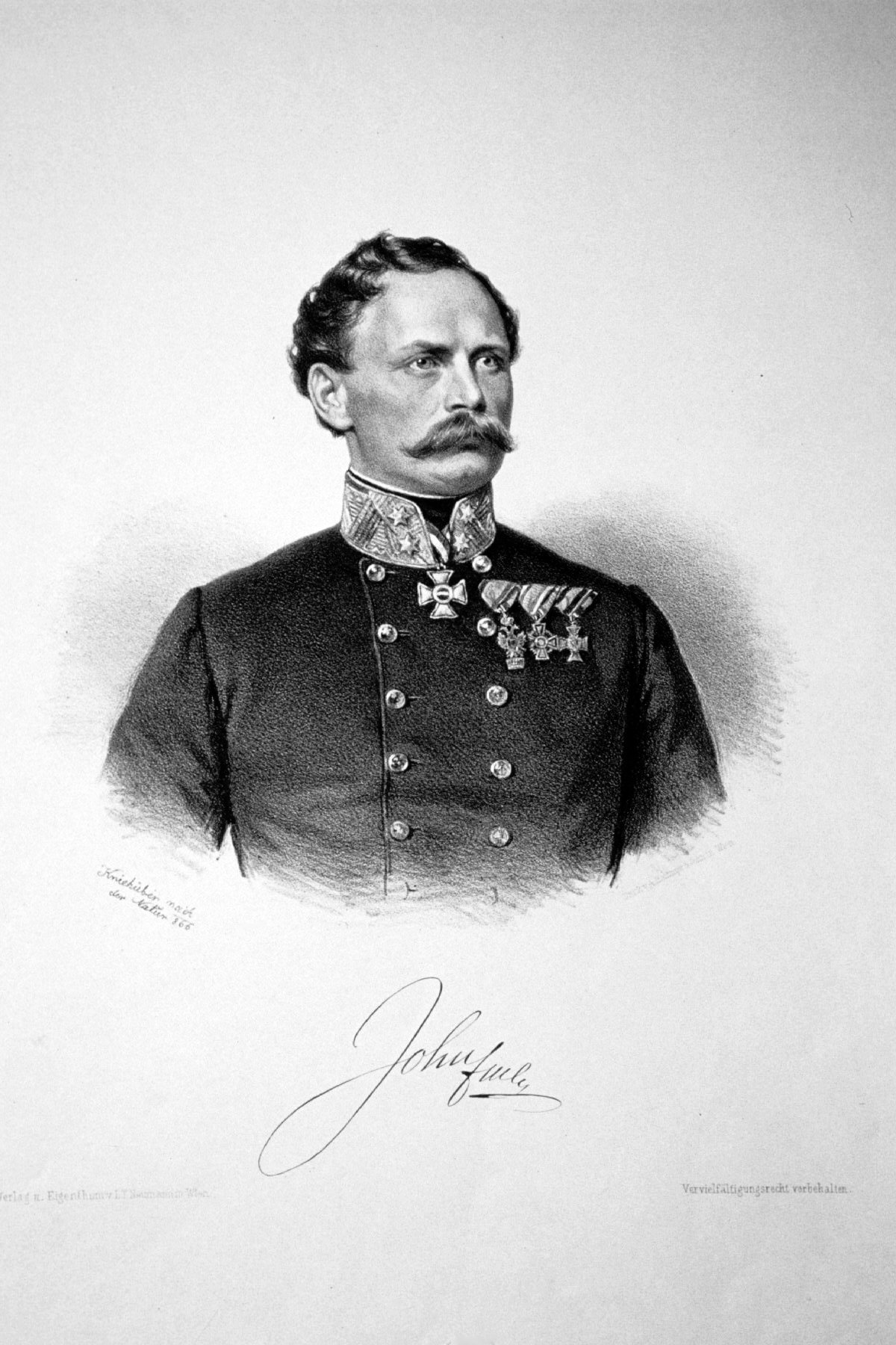 Franz Freiherr von John (1815-1876), k. k.Generalstabschef, Kriegsminister, Feldzeugmeister, Kommandeur des Maria Theresien Ordens. Lithographie von Josef Kriehuber, 1866